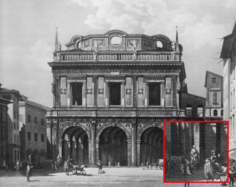 lodovica della loggia4.jpg